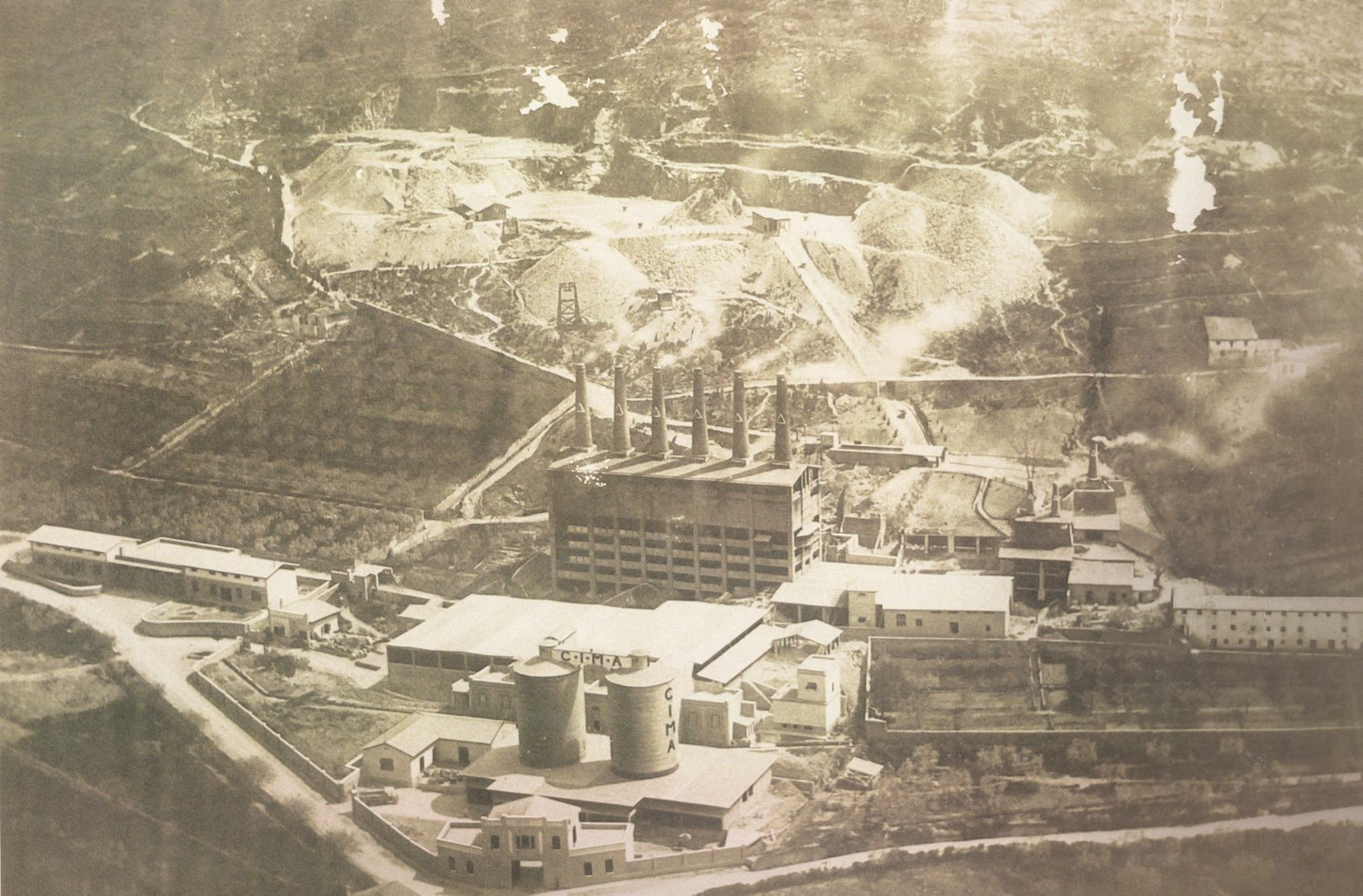 Il cementificio Marchino in una foto degli anni '20